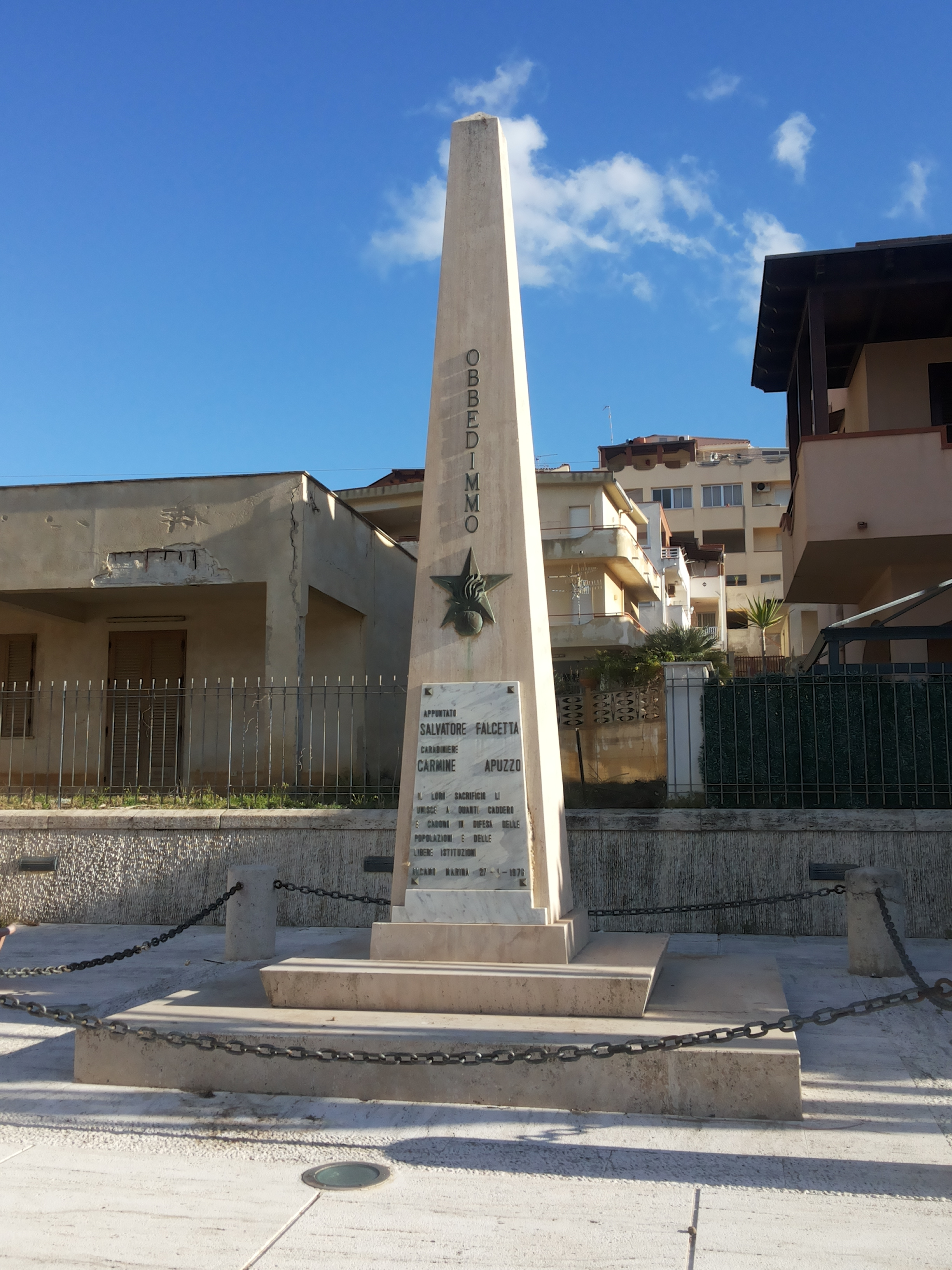 Monumeto commemorativo ad Alcamo Marina in ricordo della strage dei carabinieri Falcetta e Apuzzo.